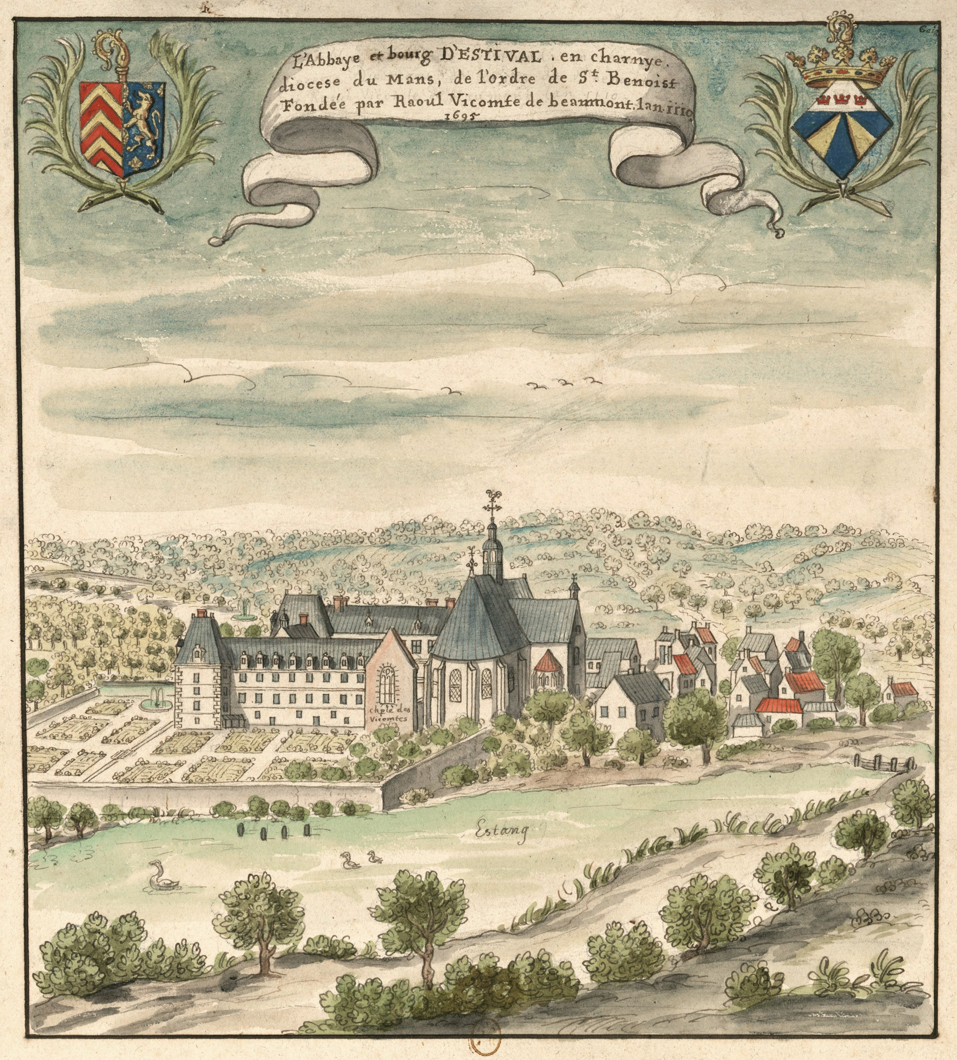 Abbaye Notre-Dame d'Etival-en-Charnie (Chemiré-en-Charnie, Sarthe)